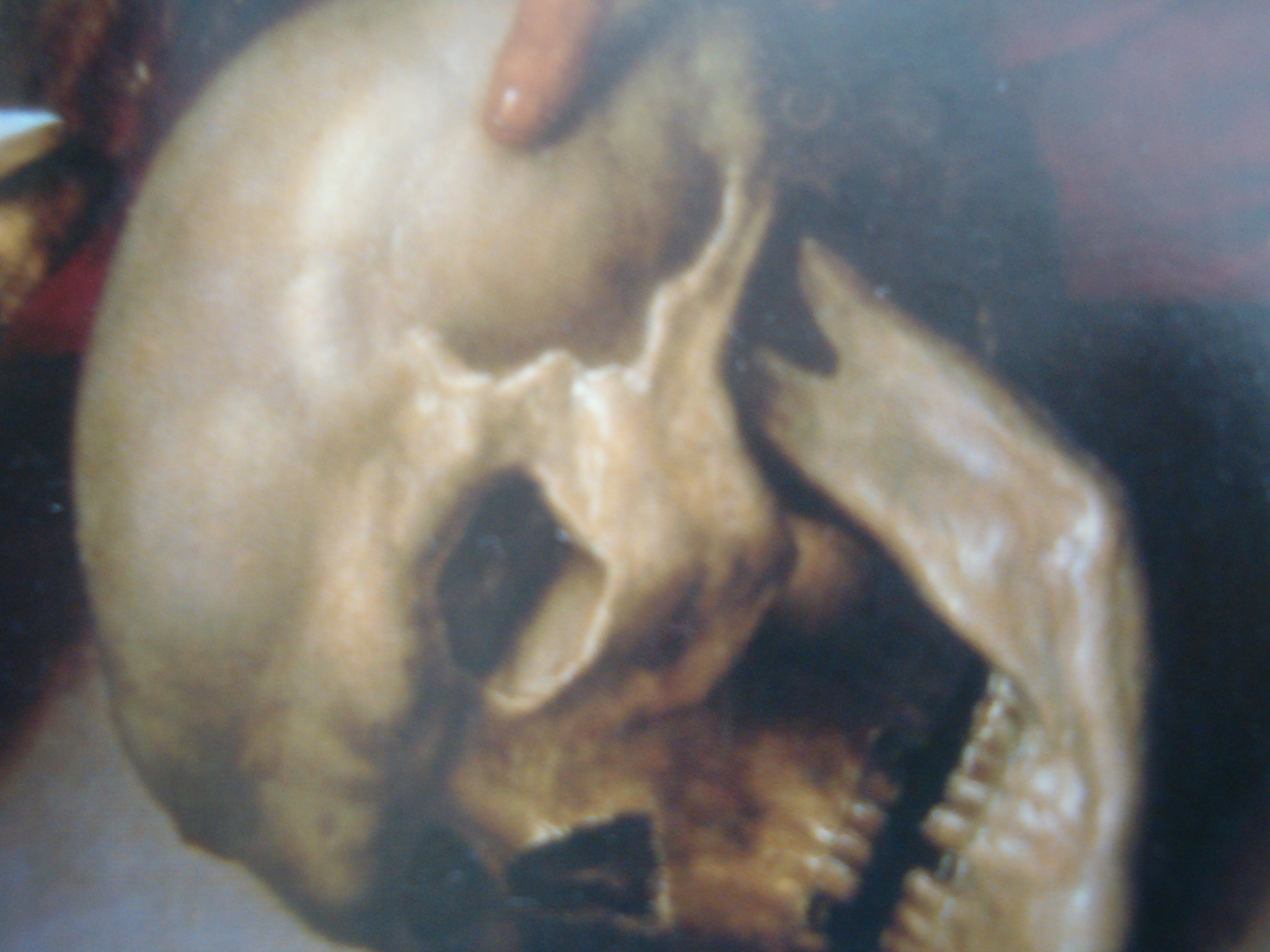 Česky: Detail u obrazu Svatý Jeroným (pravý dolní roh)